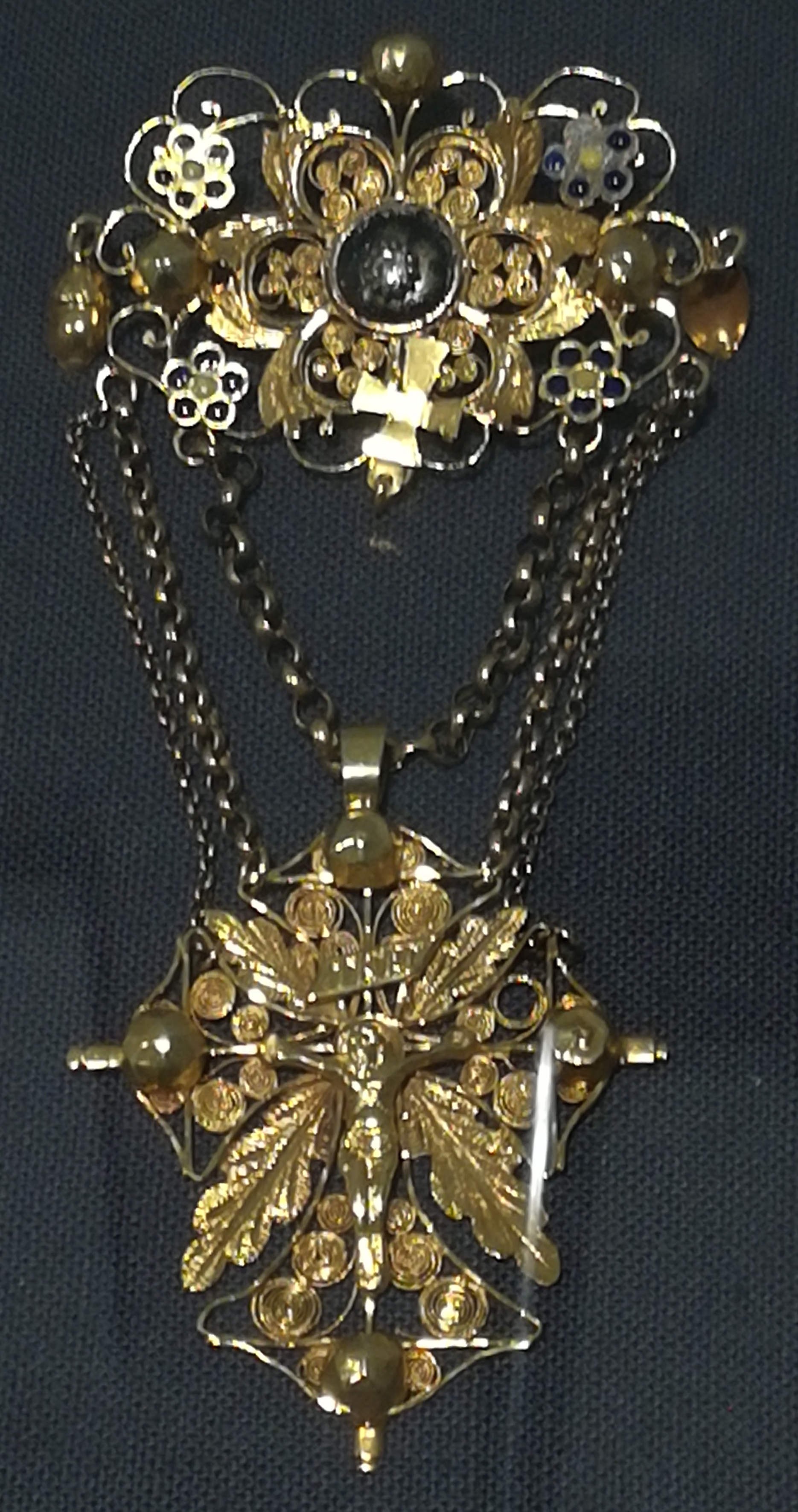 Schuwe mit Kreuzanhänger, mehrteiliger Filigranschmuck, Schatz des Aachener Gnadenbilds